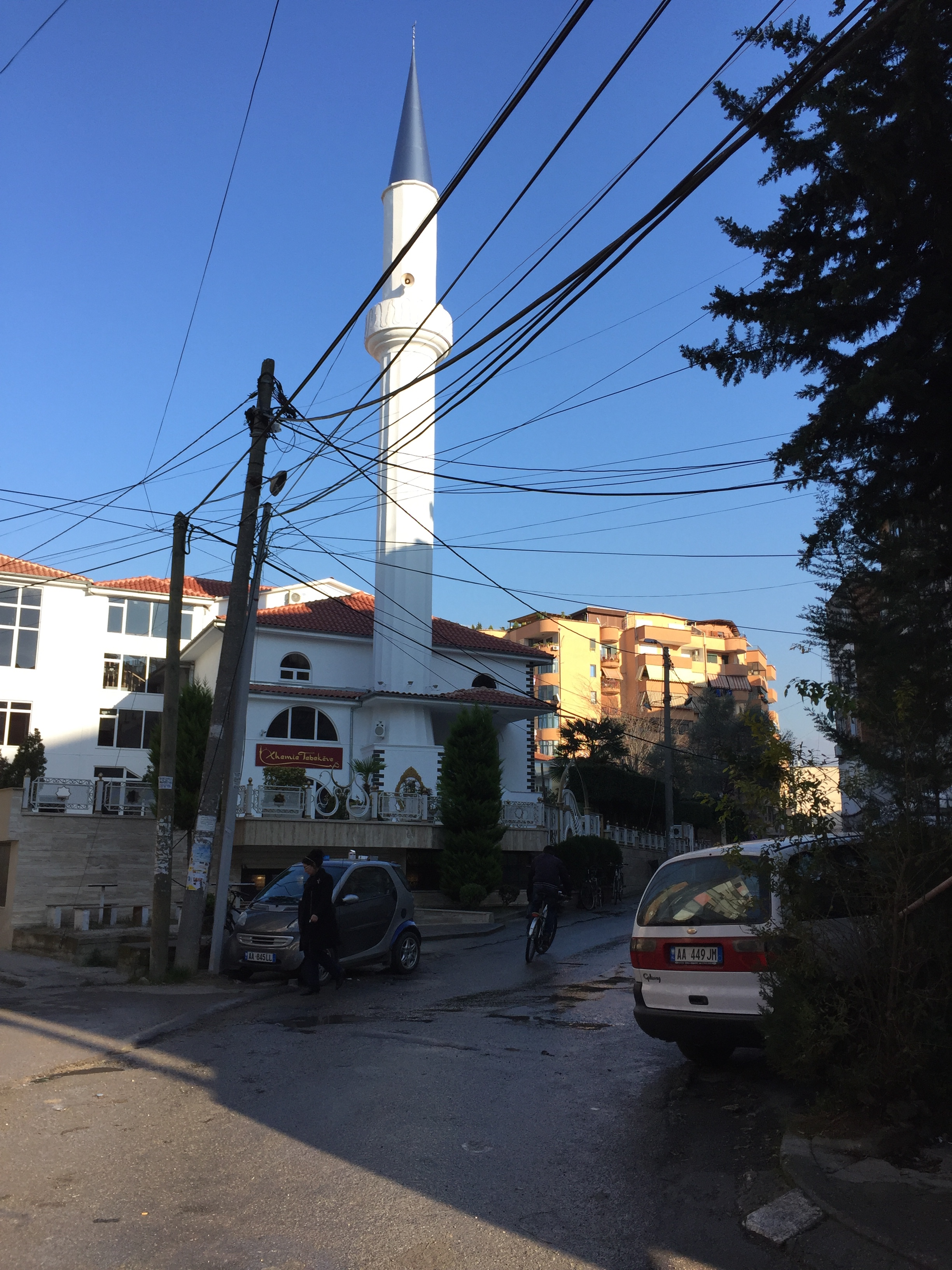 Tabakave Mosque, Tirana